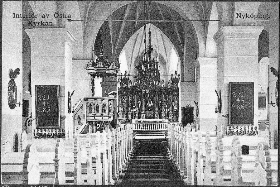 Interiör mot öster. Kategori: (02) InteriörerInteriör mot öster.